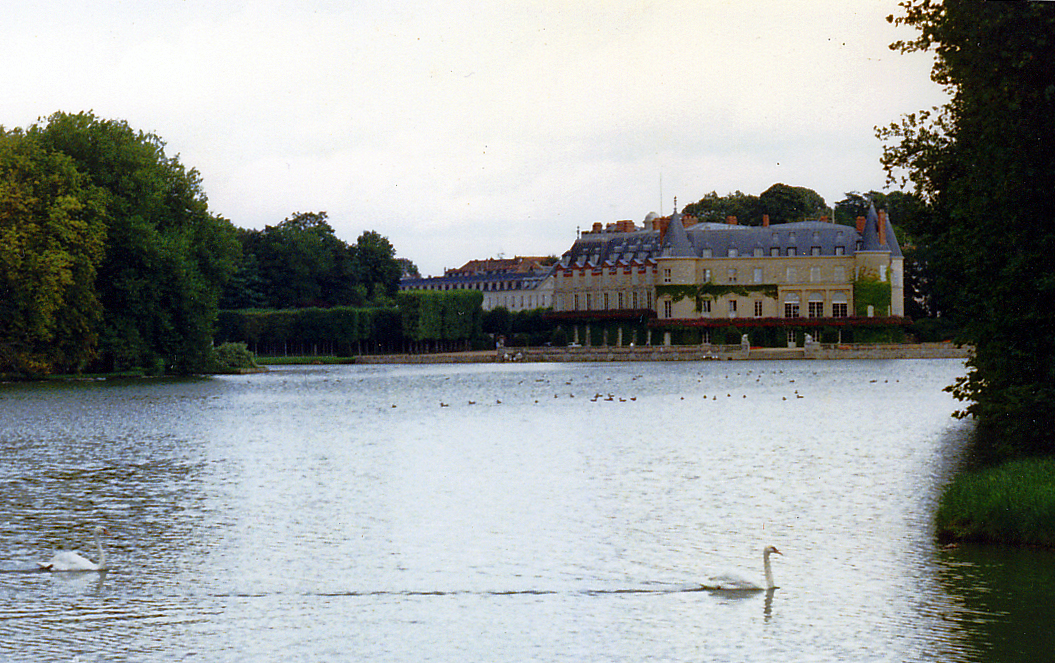 Château de Rambouillet in 1987, the summer residence of the French President, Rambouillet, Yvelines département, France.